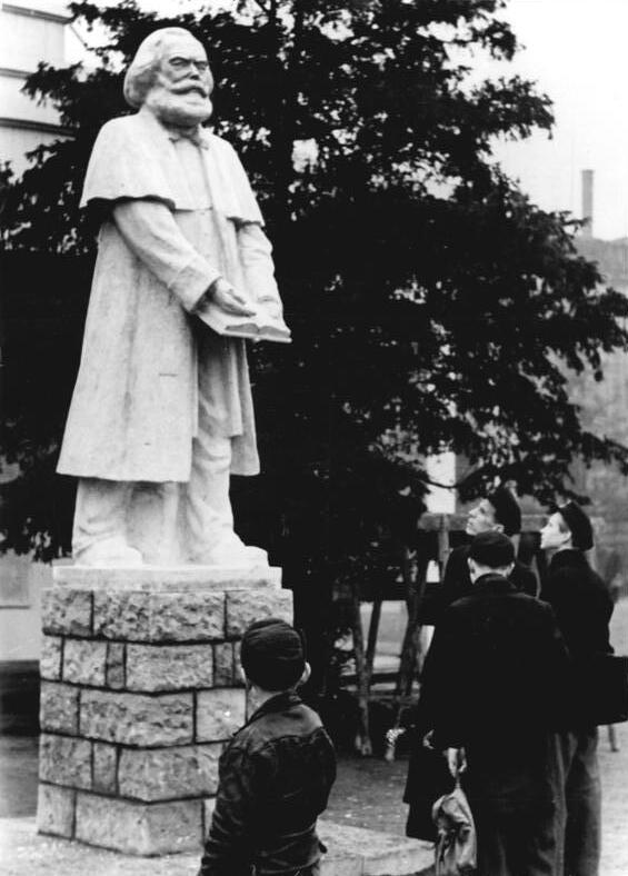 Dresden, Karl-Marx-Denkmal Zentralbild Höhne-Pohl 18.3.1953 Karl-Marx-Jahr 1953 Zum 70. Todestag von Karl Marx, des genialen Begründers des wissenschaftlichen Sozialismus, wurde in Dresden auf dem Platz der Einheit dieses monumentale Standbild, das von Bildhauer Otto Rost geschaffen wurde, aufgestellt.